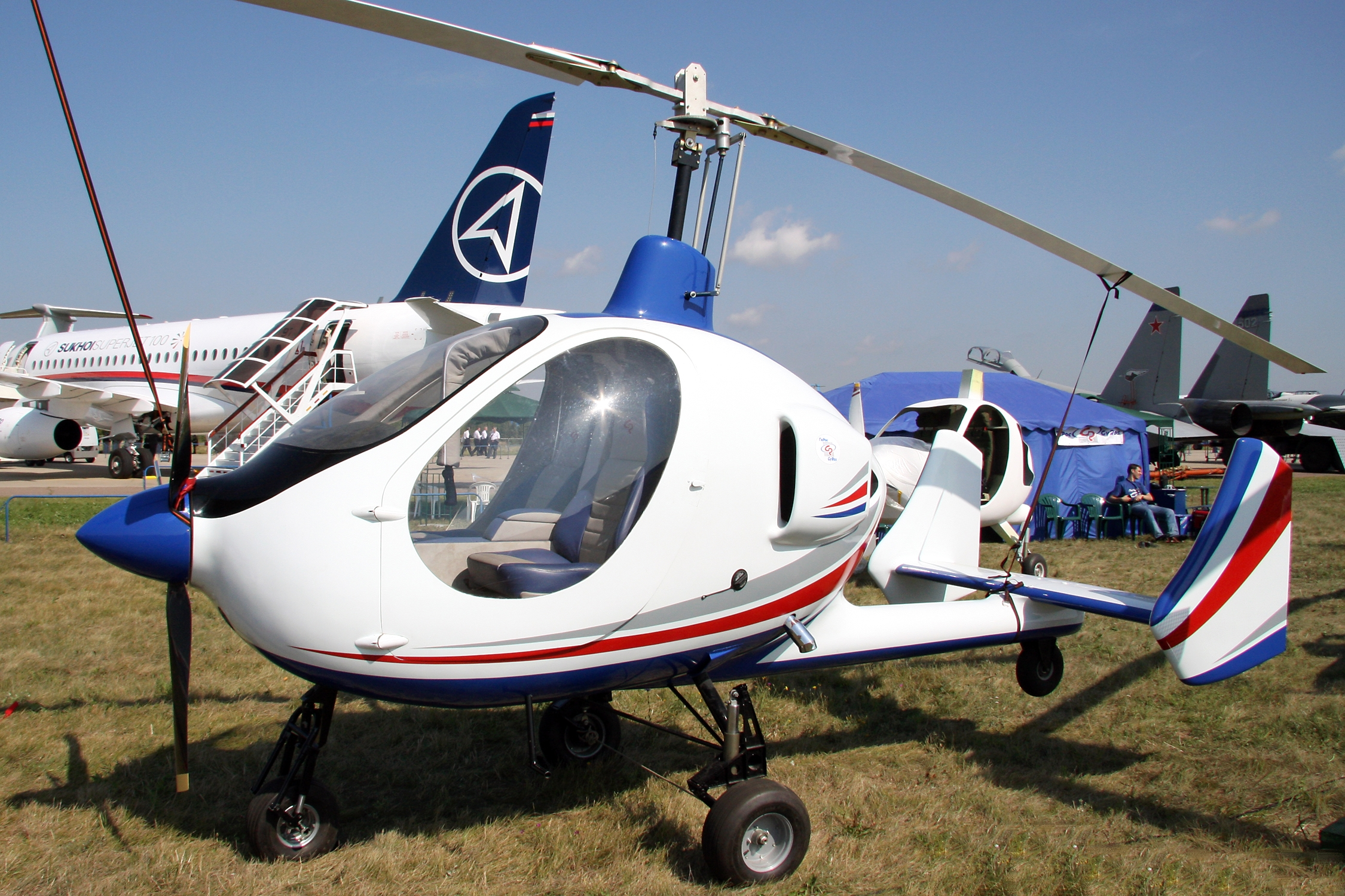 Giros-2 Eger